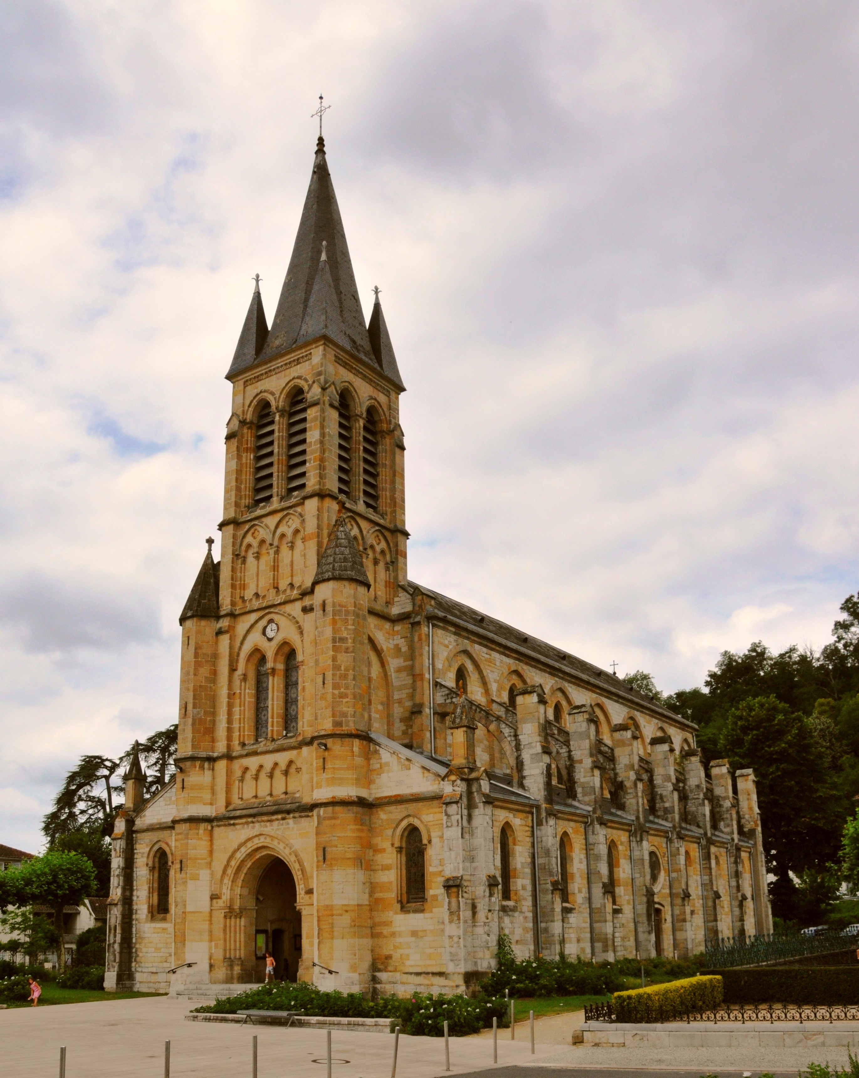 Peyrehorade, Kirche